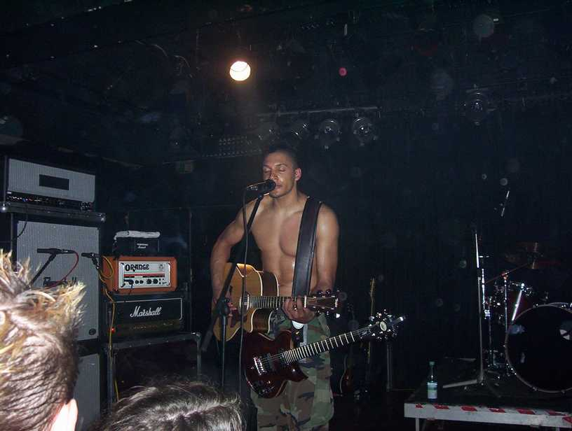 Joachim Deutschland bei einem Konzert am 23. April 2005 in Reichenbach an der Fils